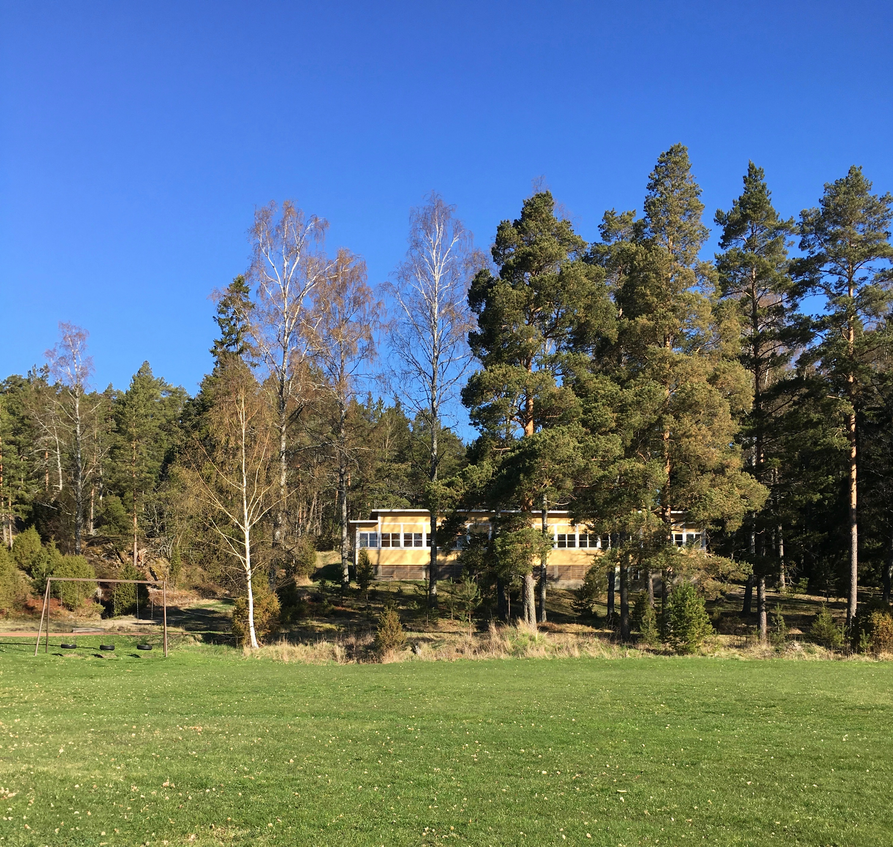 Sotapoikien leiriparakki Pensarissa